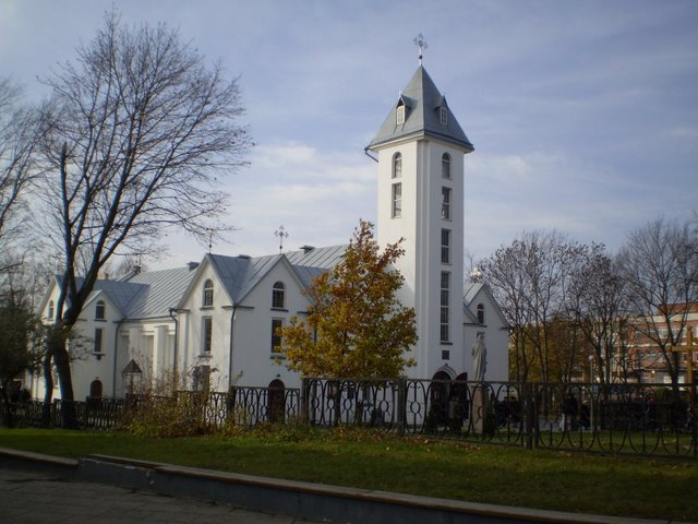 Radviliškio bažnyčia, 2009 04 04